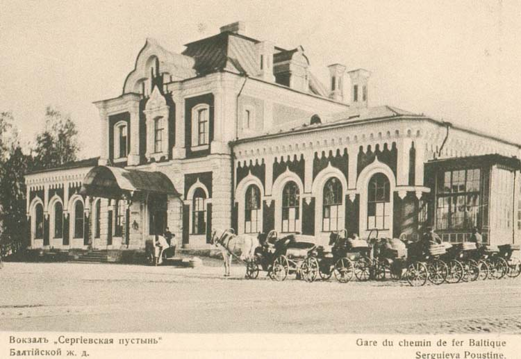 Вокзал станция «Сергиевская Пустынь» до революции 1917 года. Ныне это станция Володарская.